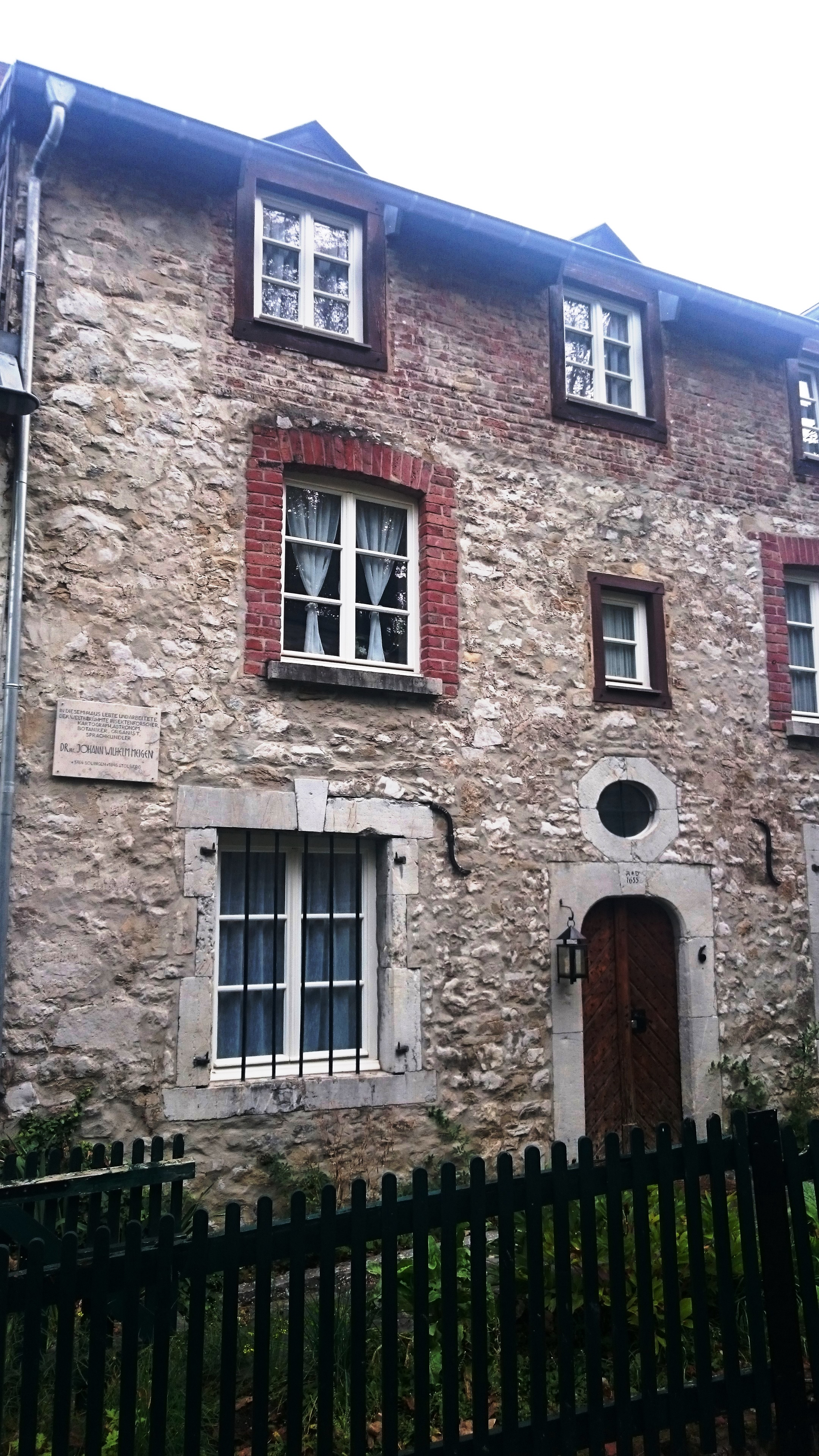 Ehemaliges Wohnhaus von Dr. Johann Wilhelm Meigen in Stolberg Rheinland